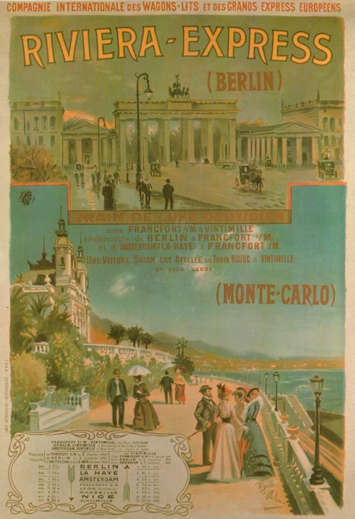 Plakat für den Riviera-Express, 1903